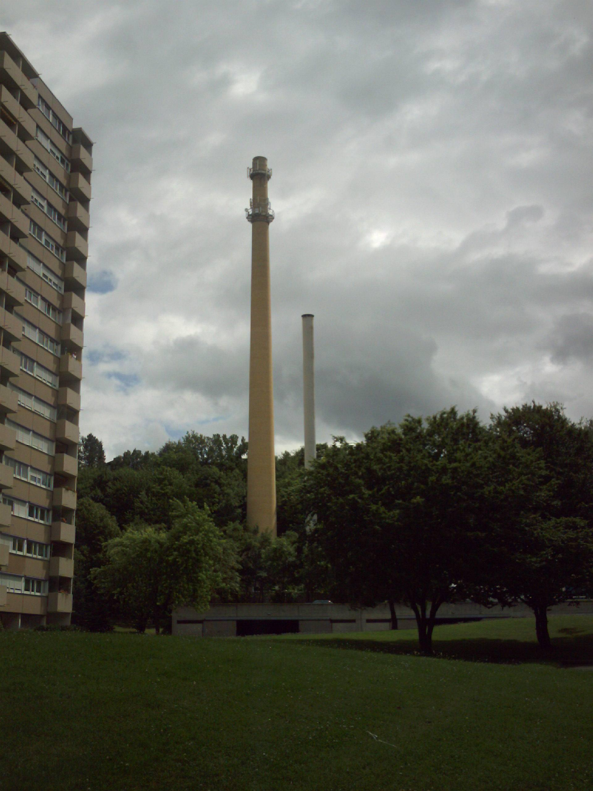 Kamin des Heizwerks Böblingen